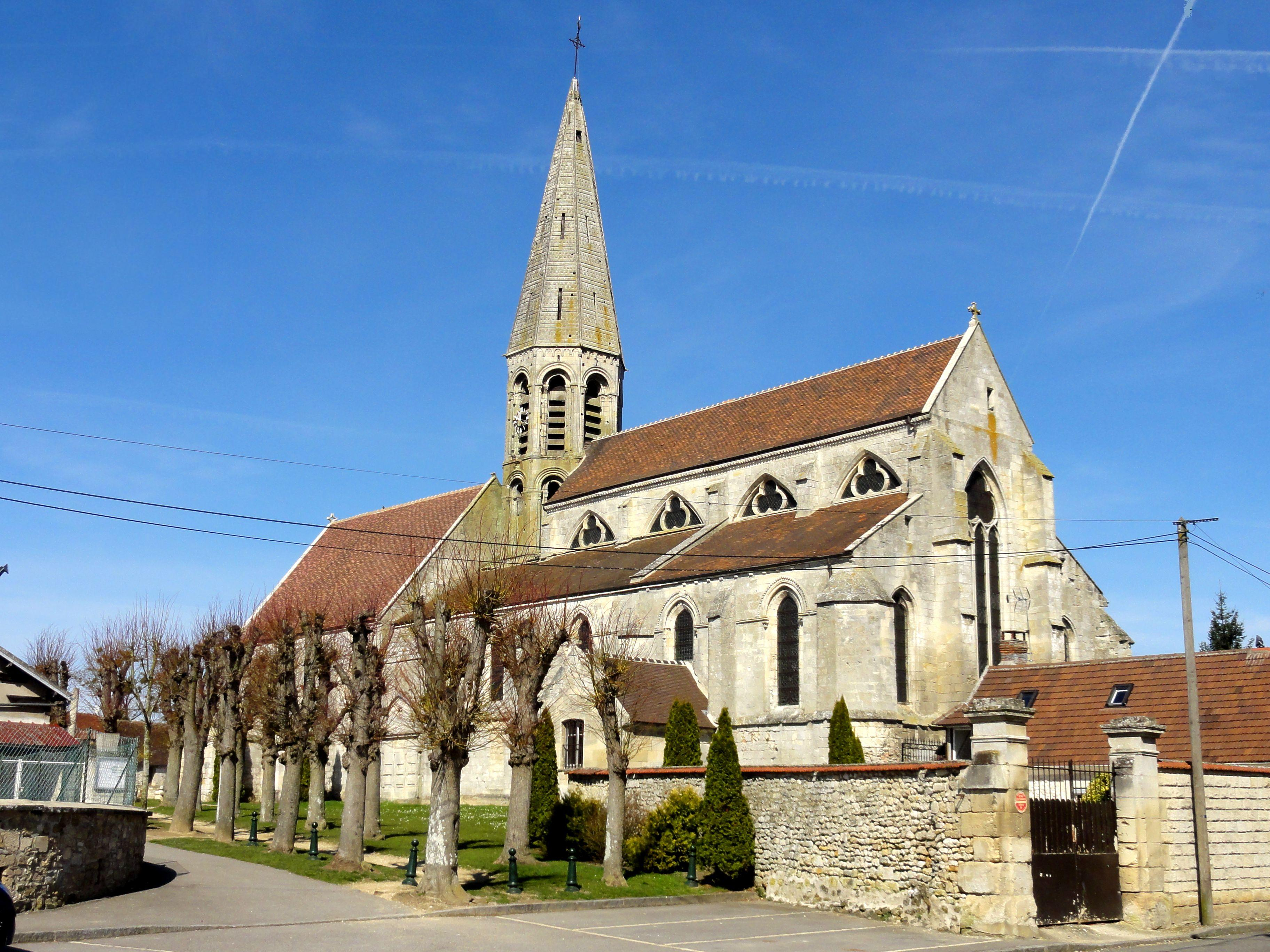 Vue depuis le sud-est.